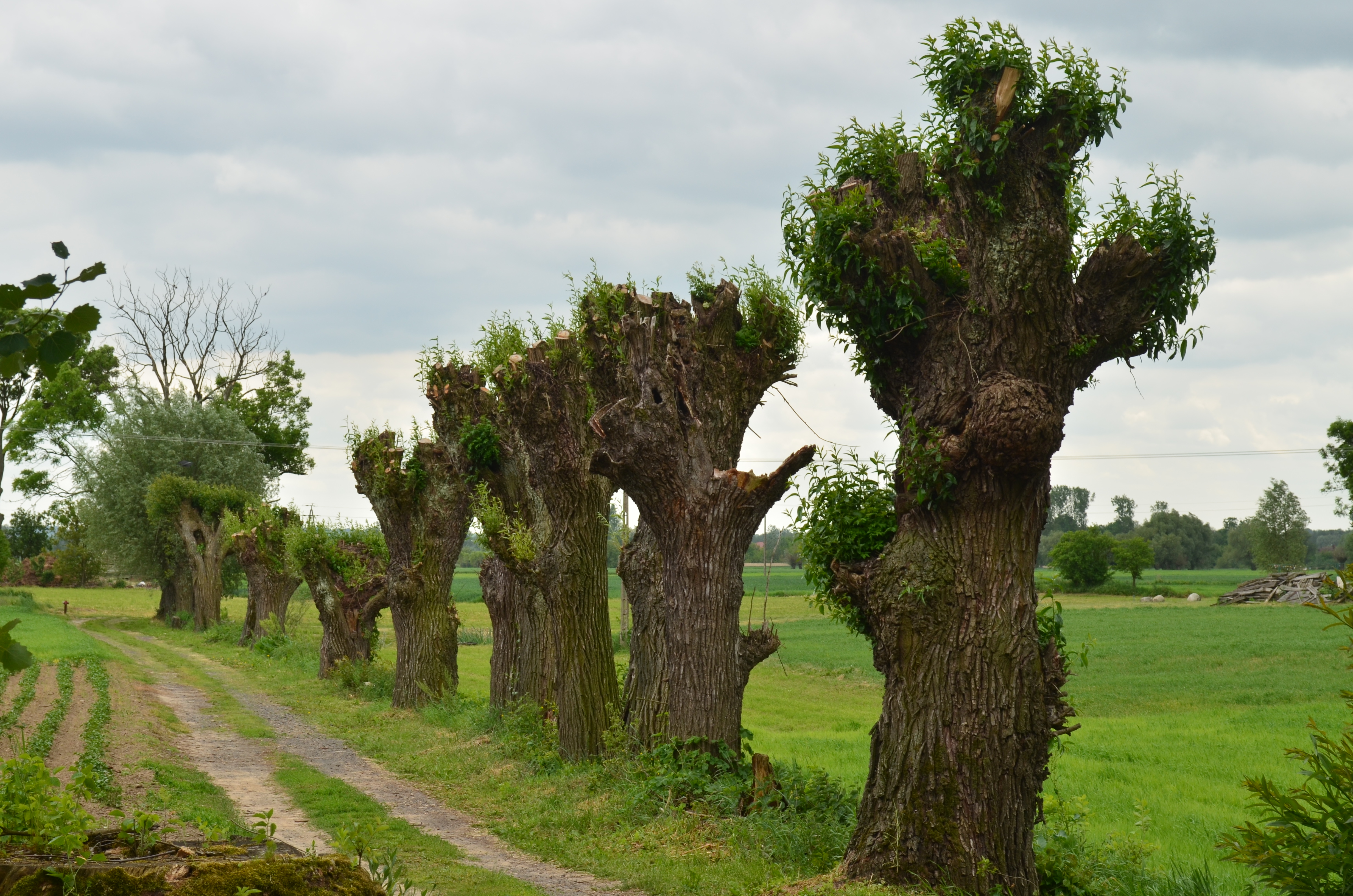 Ogłowione wierzby w Nowym Troszynie - pozostałość po osadnictwie olęderskim